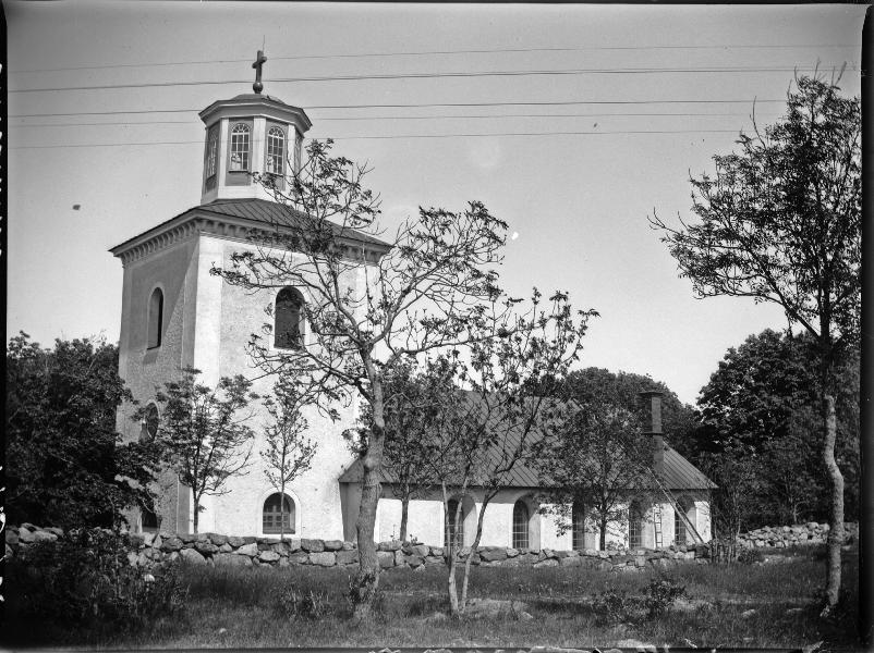 Kyrkan mot nordöst.